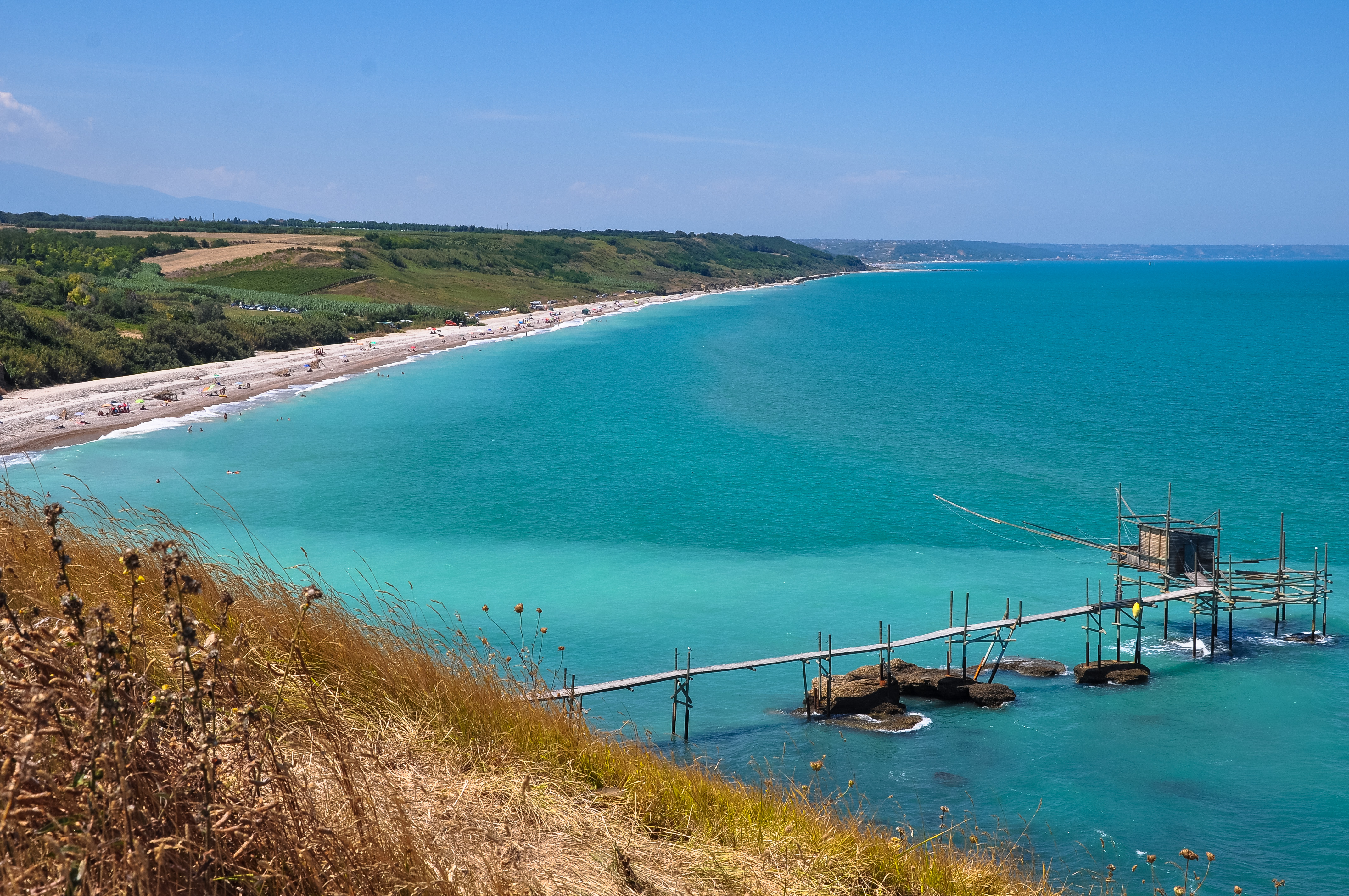 Riserva naturale di Punta Aderci, Vasto